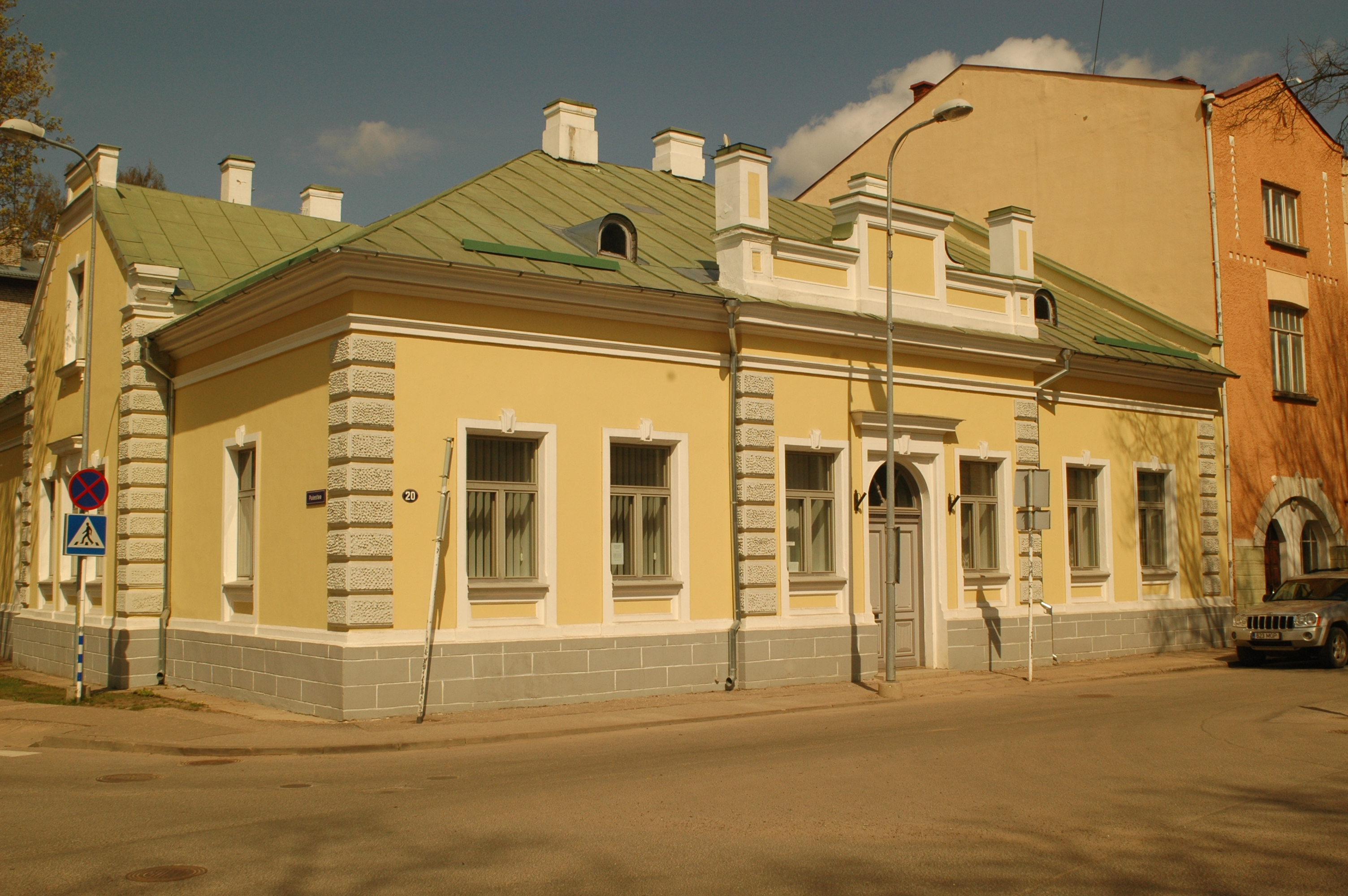 Valga Keskraamatukogu asus selles majas